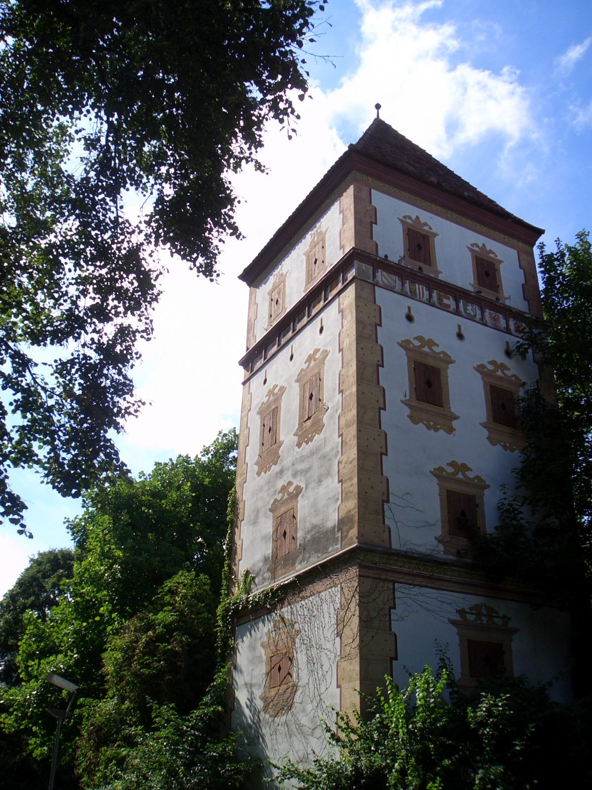 Welser Wasserturm am Zwinger (Vorderseite)